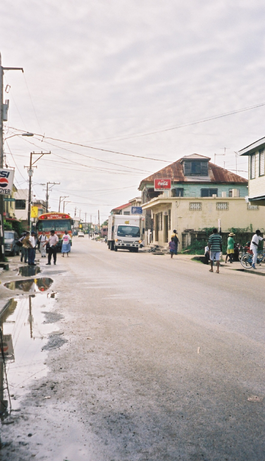 Dangriga, BelizeStreets of Dangriga